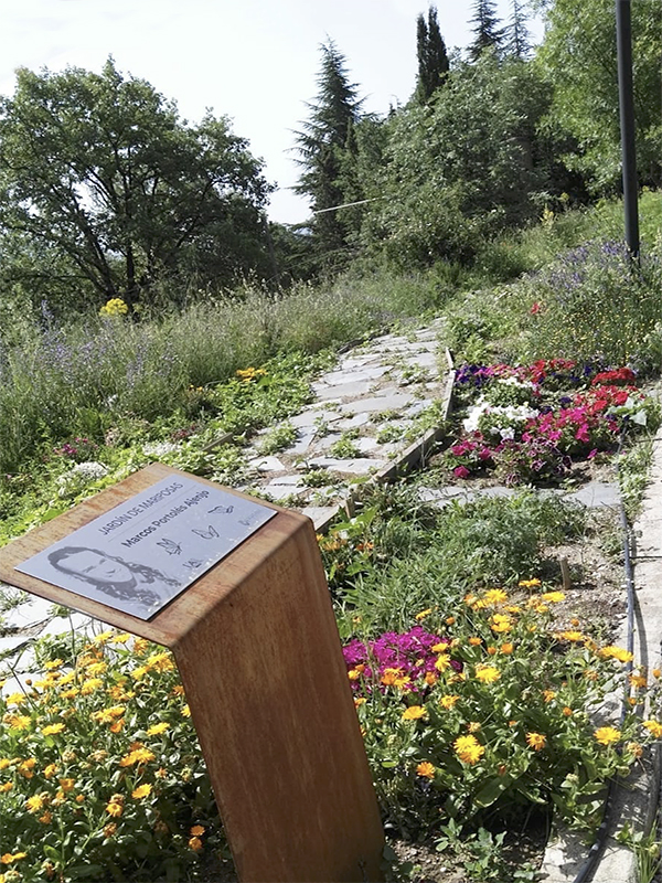 Xardín de Caparines "Marcos Portolés Ajenjo"